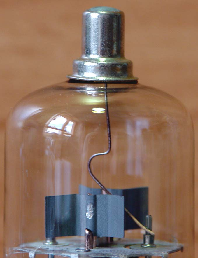 Anodenkappe einer PL36-Elektronenröhre